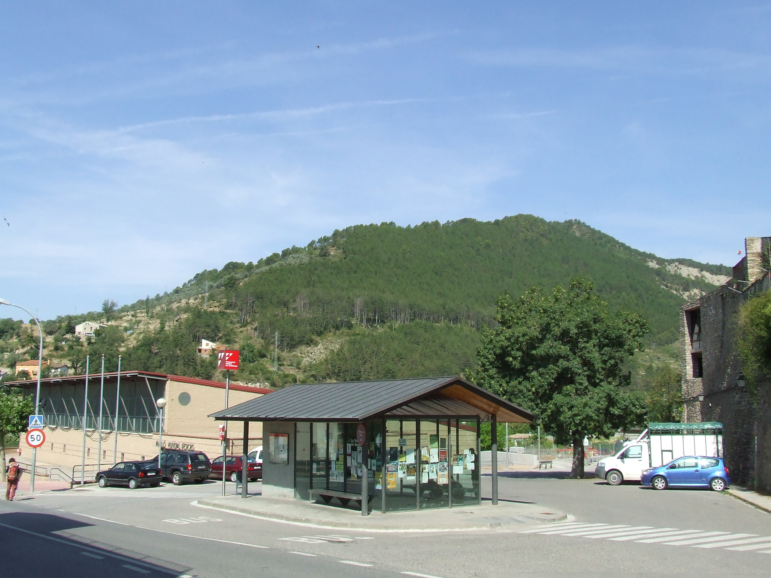 La partida de Vileres, al fons, damunt l'Estació d'autobusos (la Pobla de Segur, Pallars Jussà)